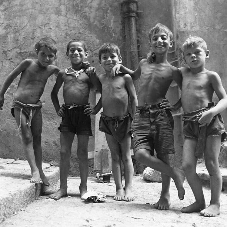 Wayne Miller - Napoli, scugnizzi nel pedriodo estivo.